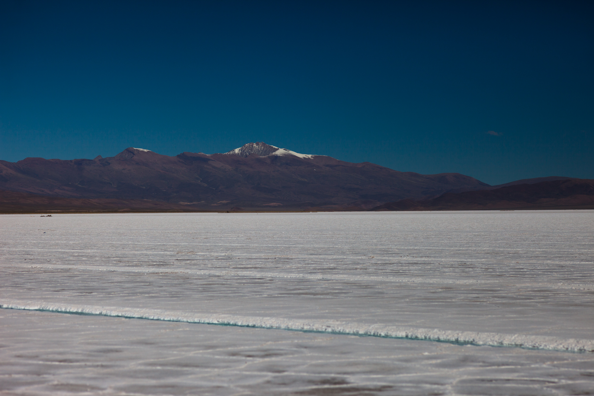 Salinas Grandes. límite interprovincial de Salta y Jujuy. Argentina.